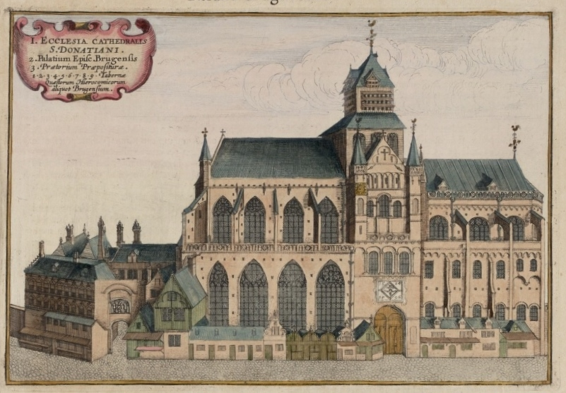 Sint Donaas Kathedraal in 'Flandria Illustrata'